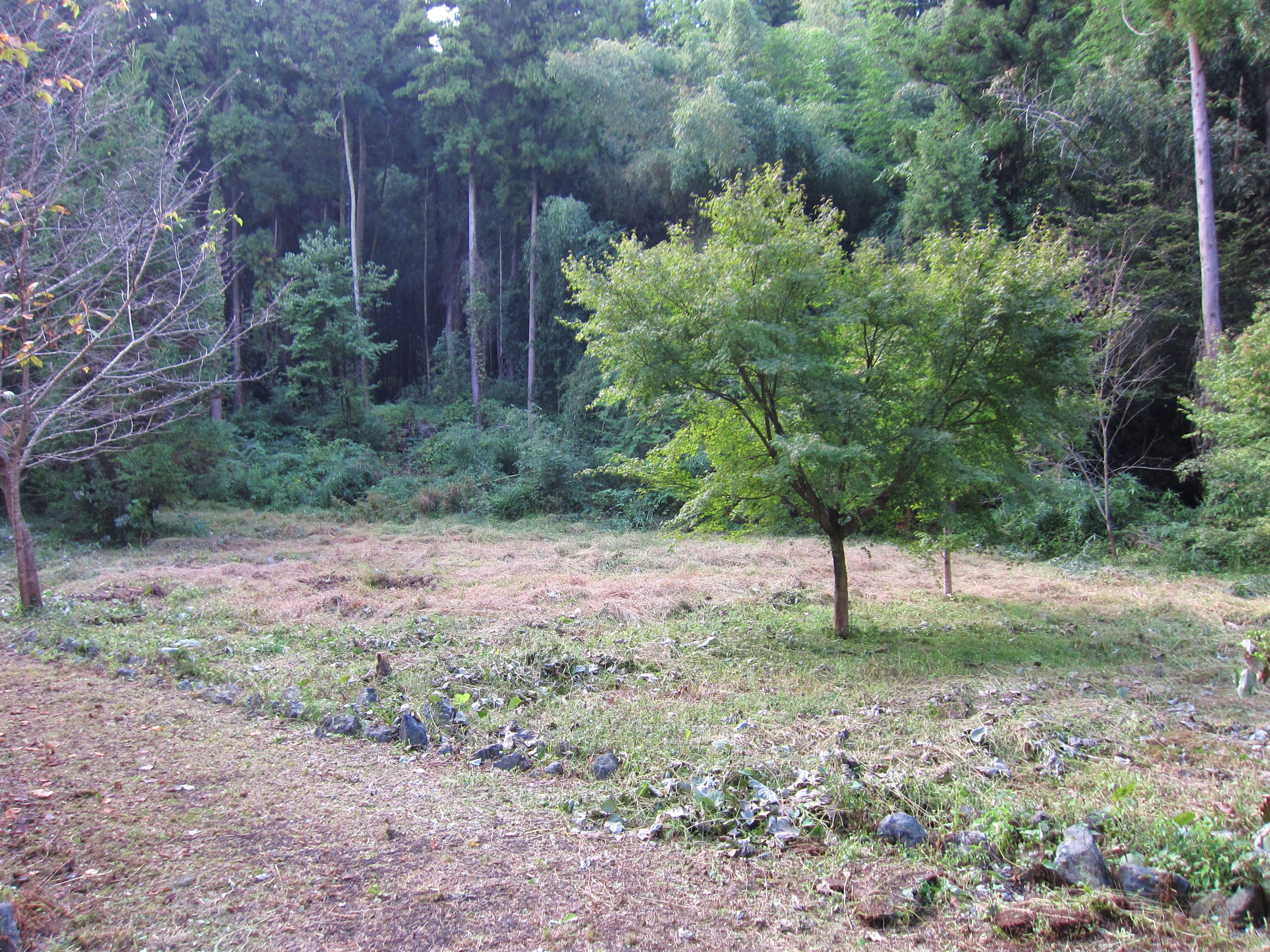 金鑚神社 法楽寺跡